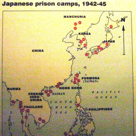 廣布東亞的集中營, 包括在臺灣的4座